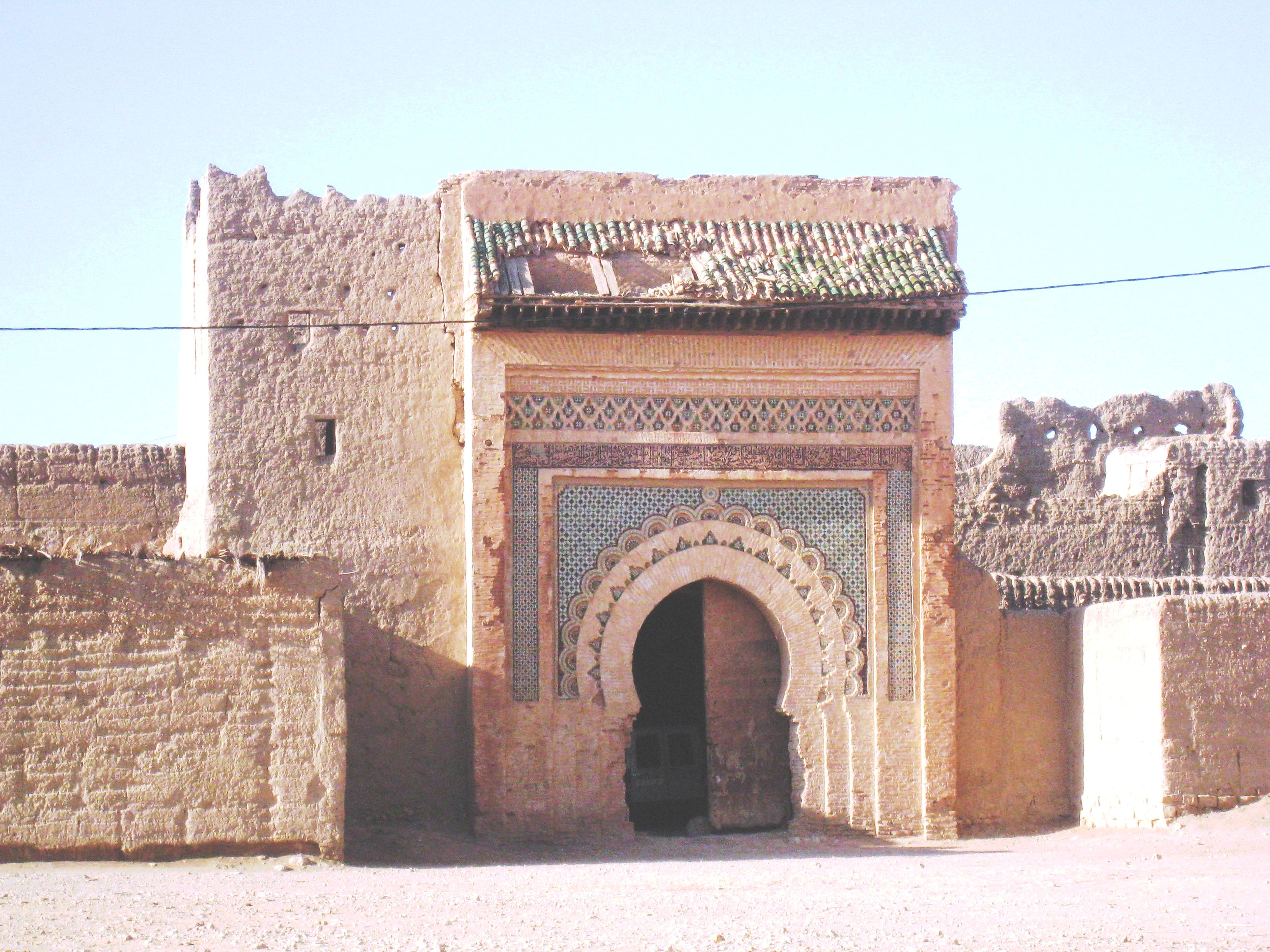 bab jdid